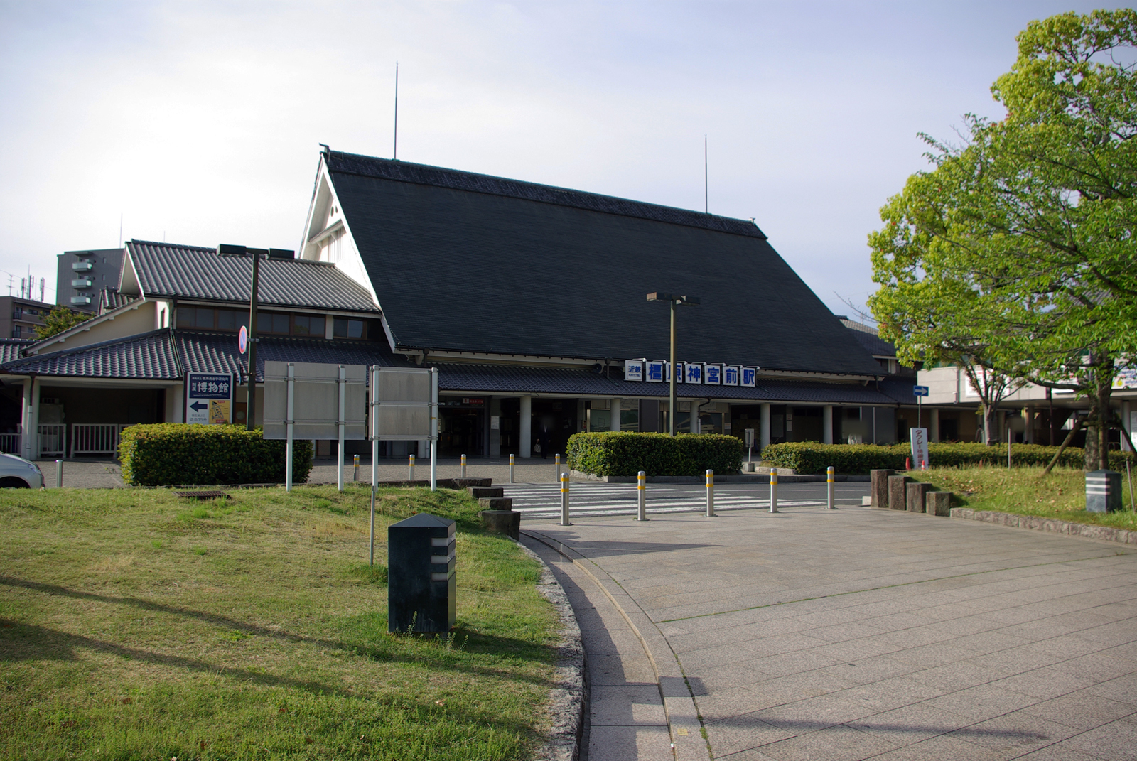 近鉄橿原神宮前駅